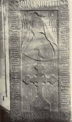 Vereb Péter sírköve, 1403, Mátraverebély